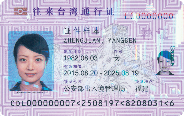 大陸居民往來臺灣通行證卡式版正面